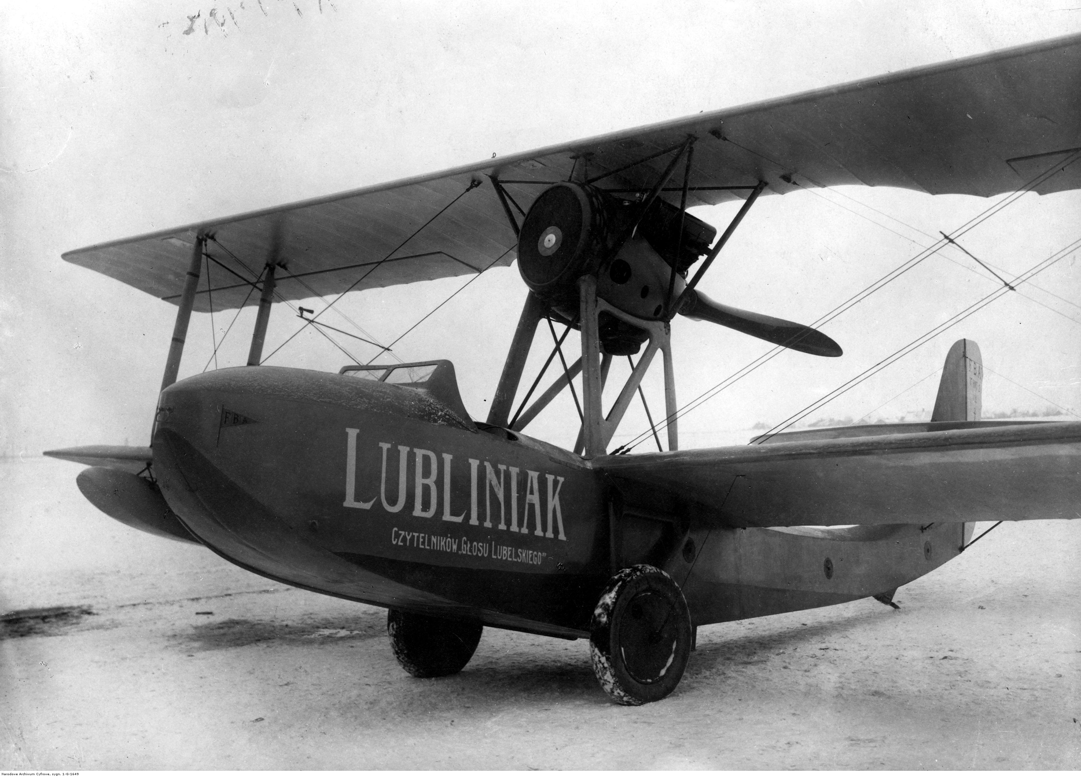 Łódź latająca Schreck FBA-17 HMT2 "Lubliniak", ufundowana ze składek czytelników "Głosu Lubelskiego".